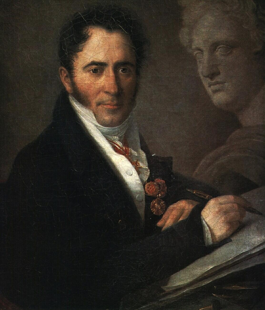 Портрет гравера Н.И. Уткина. The Radischev Art Museum